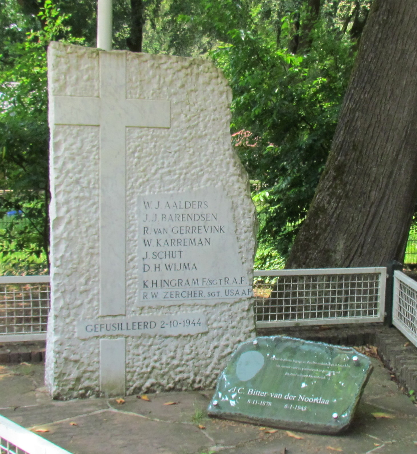 Het Apeldoornsche Bosch, monument voor op 2 oktober 1944 gefusilleerden